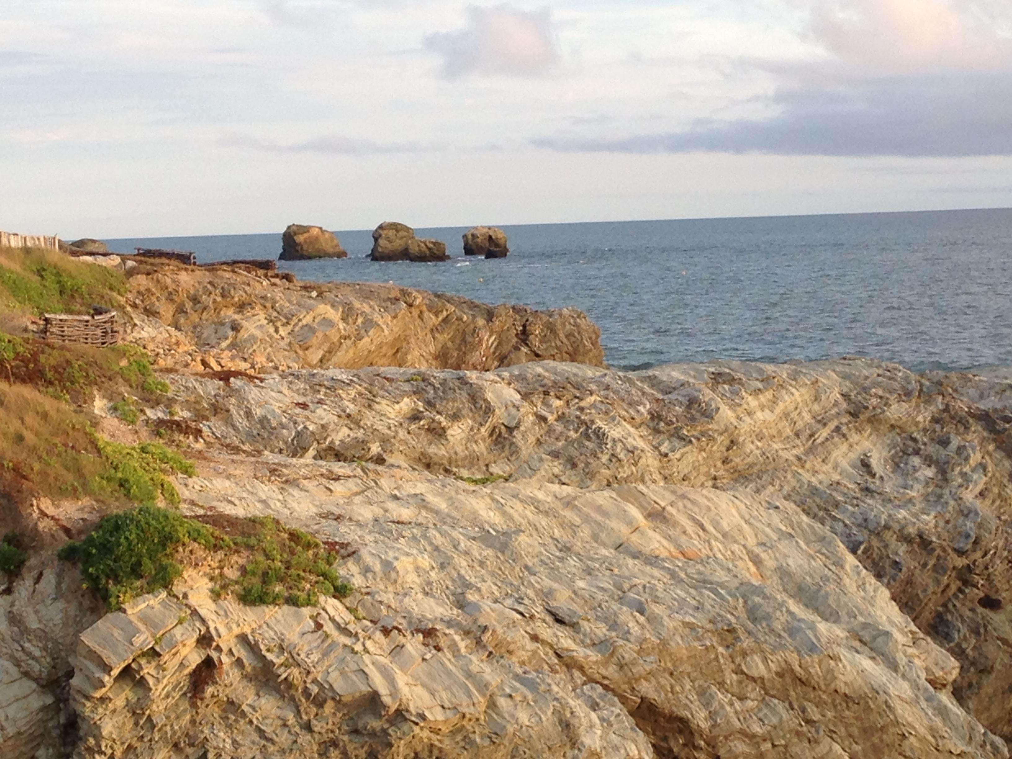 Une magnifique paysage